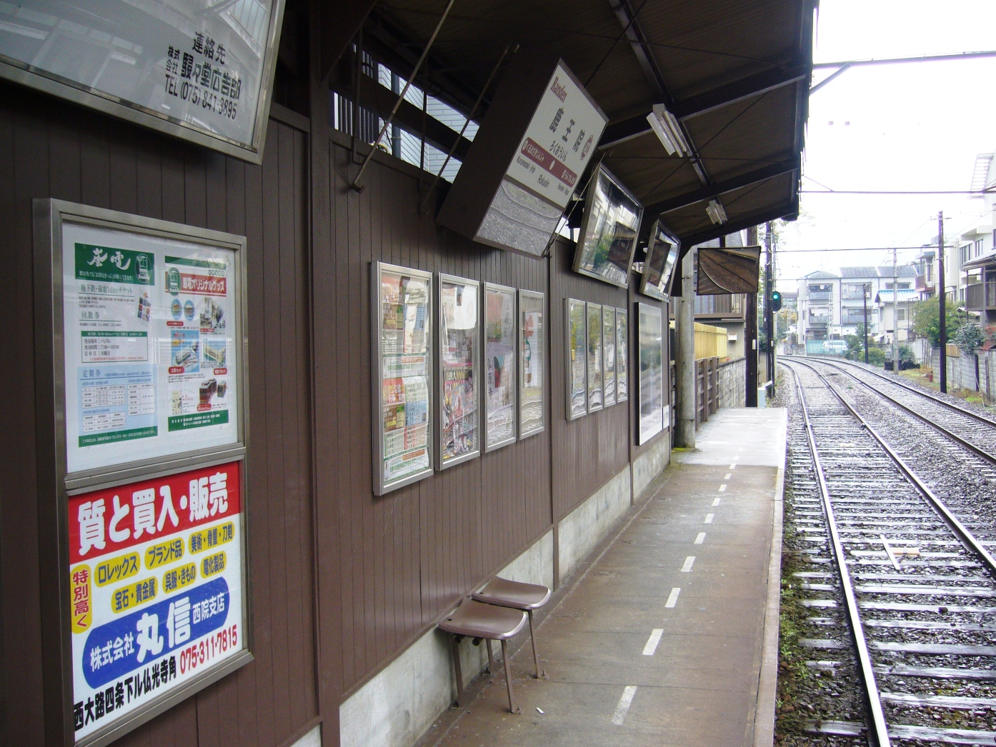 京福電気鉄道嵐山本線鹿王院駅の嵐山駅方面行きホーム。極めて幅の狭いホームに、背もたれ部分をカットされたベンチが2席だけ設置されている。2008年11月29日に投稿者が撮影。